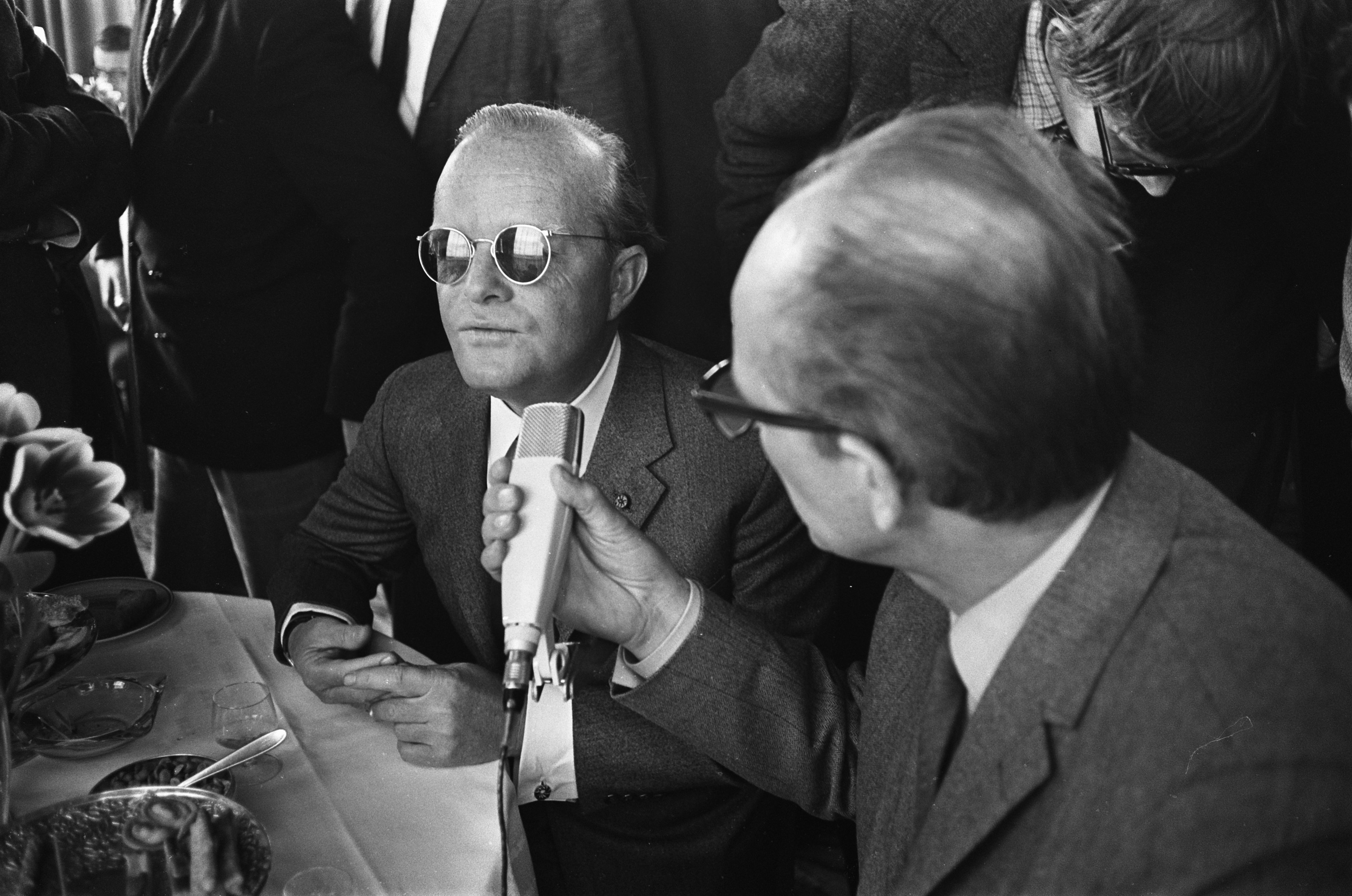 Collectie / Archief : Fotocollectie Anefo Reportage / Serie : [ onbekend ] Beschrijving : Filmpremiere in Du Midi, "In Koelen Bloede" ("In Cold Blood") naar het boek van Truman Capote. Truman Capote tijdens persconferentie Datum : 14 maart 1968 Locatie : Amsterdam, Noord-Holland Trefwoorden : auteurs, bioscopen, films, microfoons, pers, premieres, schrijvers Persoonsnaam : Capote Truman Instellingsnaam : Du Midi Fotograaf : Koch, Eric / Anefo Auteursrechthebbende : Nationaal Archief Materiaalsoort : Negatief (zwart/wit) Nummer archiefinventaris : bekijk toegang 2.24.01.05 Bestanddeelnummer : 921-1642